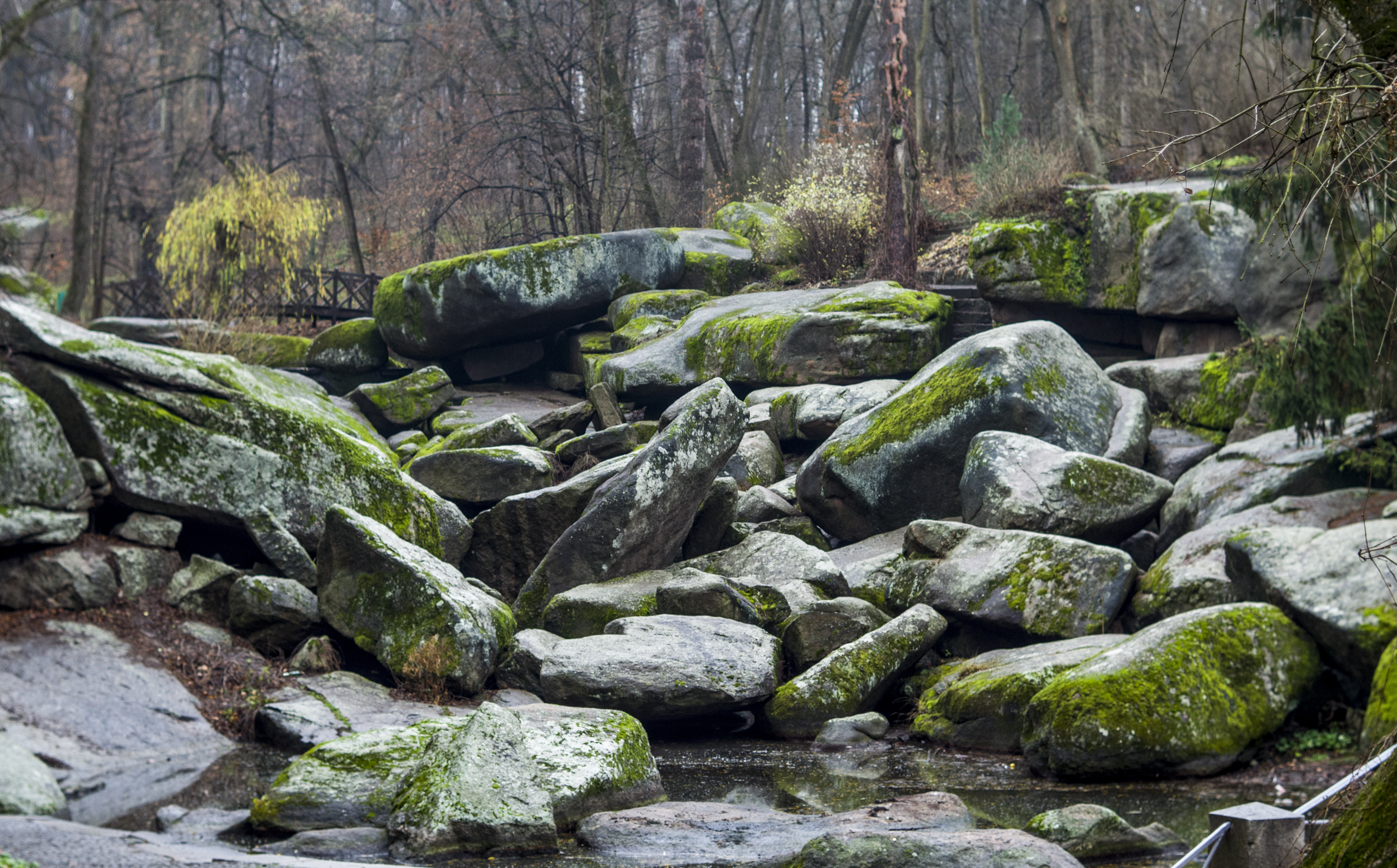 «Софіївка», Уманський район, м. Умань